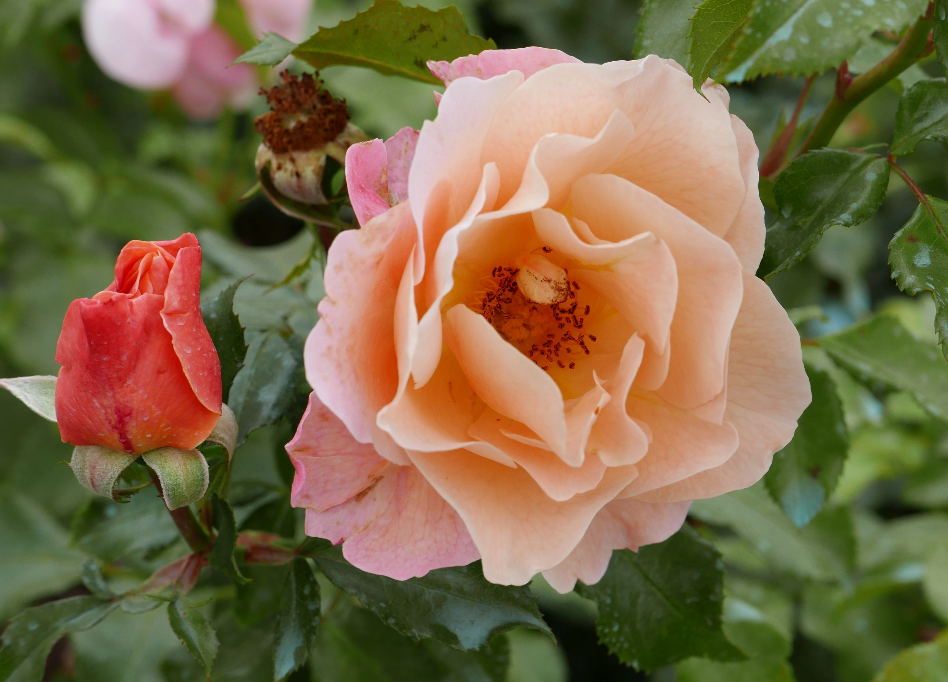 Rosa 'Marie Curie', eingeführt von Meilland 1997